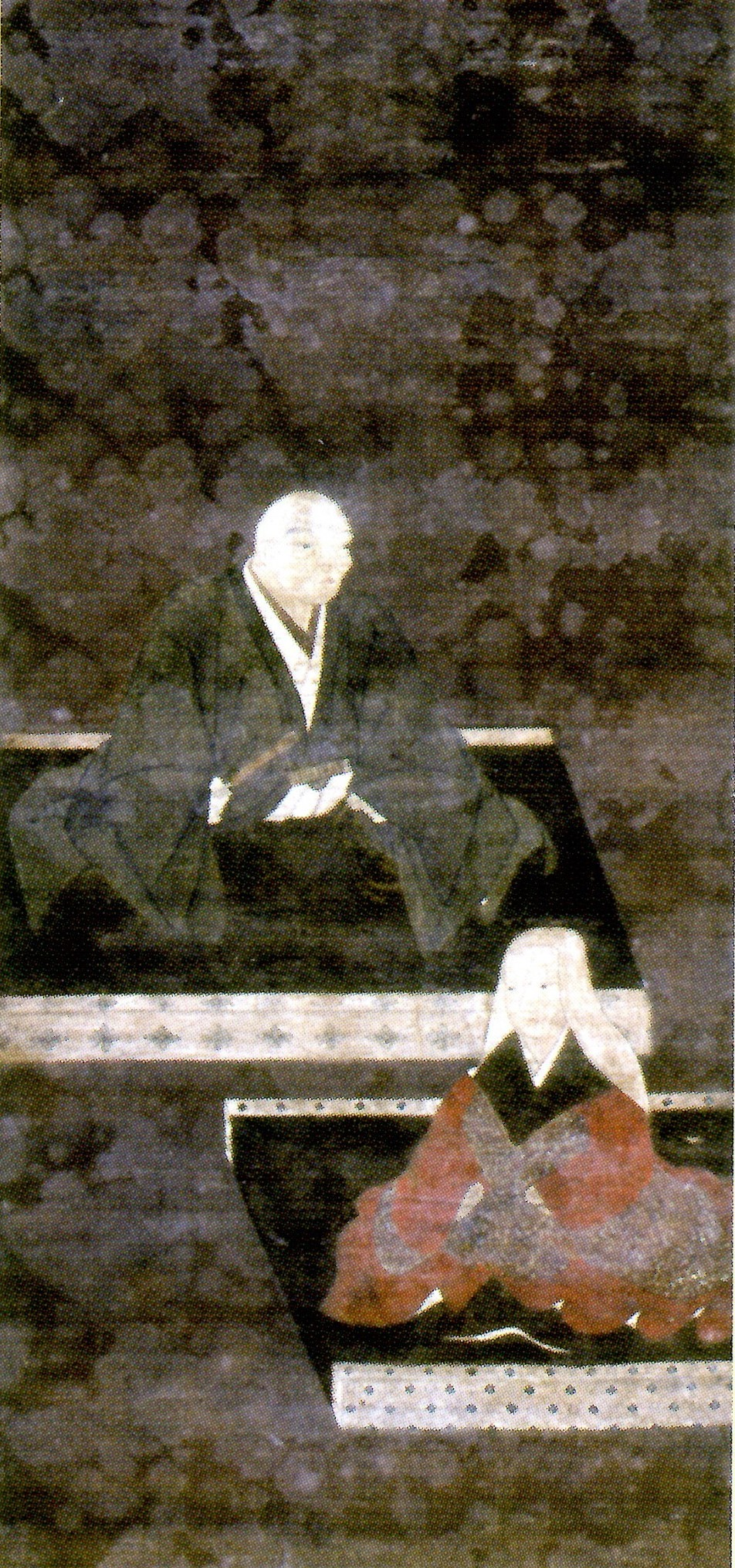 葛西清重とその妻の肖像。